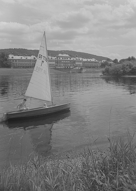 Original image description from the Deutsche FotothekDresden. Schloss Pillnitz, Blick zum Wasserpalais über die Elbe